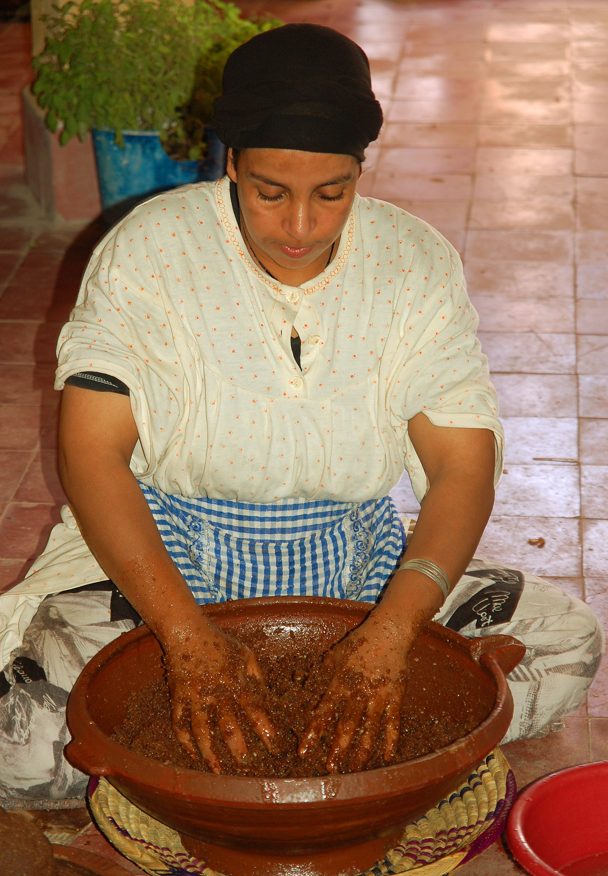 Maroc Essaouira city